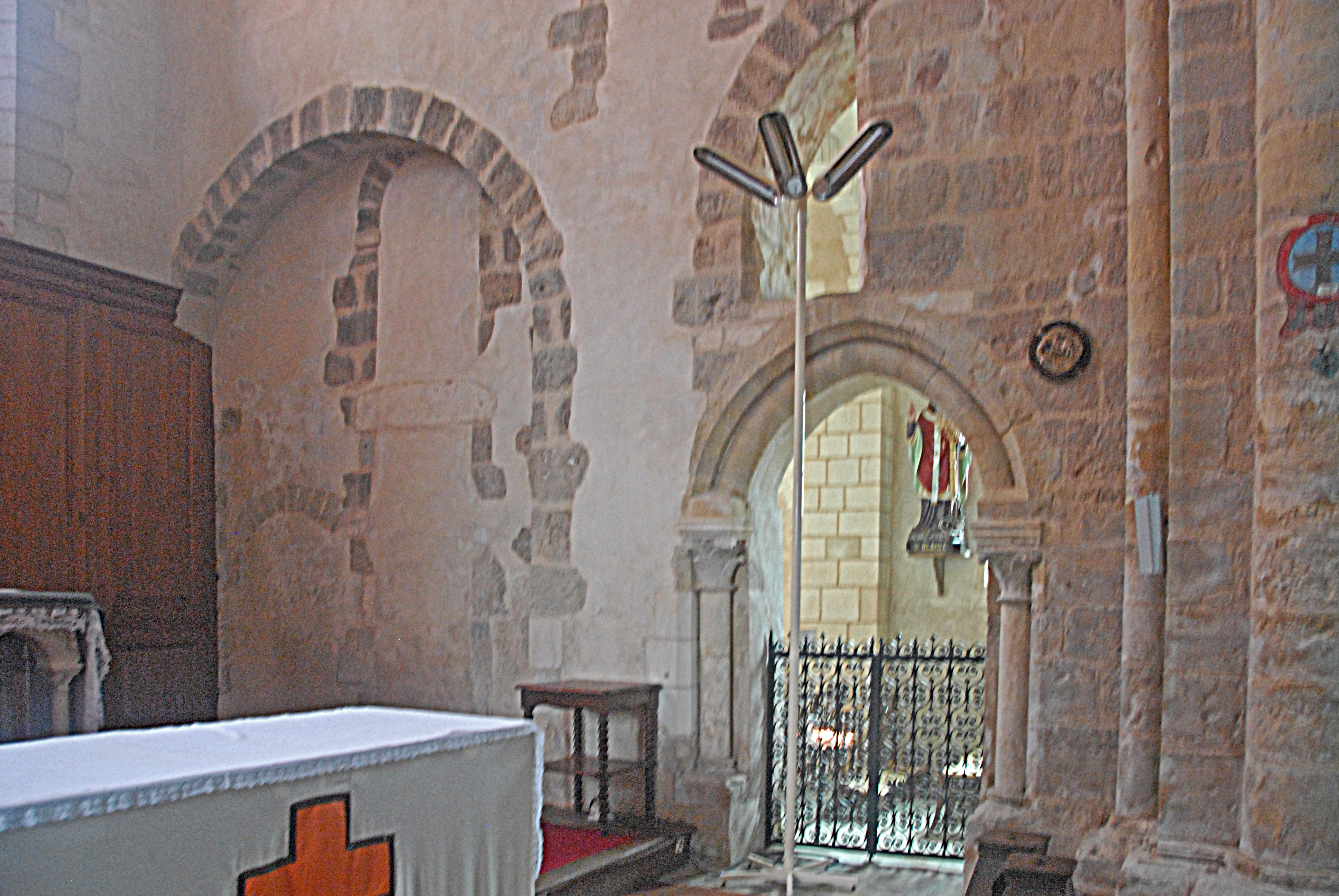 Neuvy_St.-Sépulcre, Basilika, Mittelschiff, SW-Wand, Chorjoch